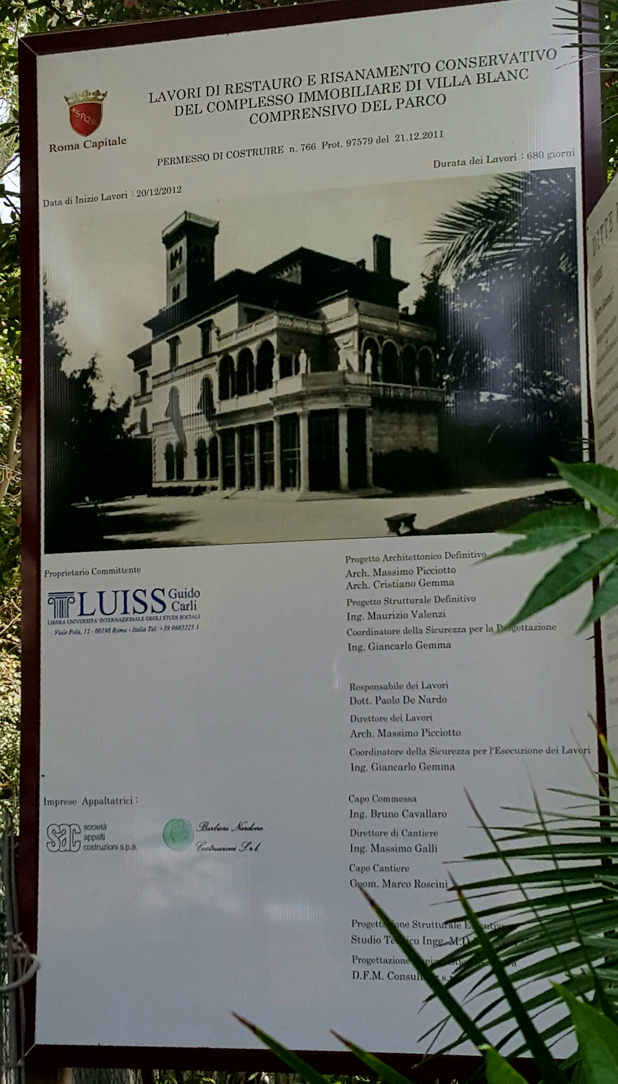 Cartello descrittivo del restauro di Villa Blanc a Roma